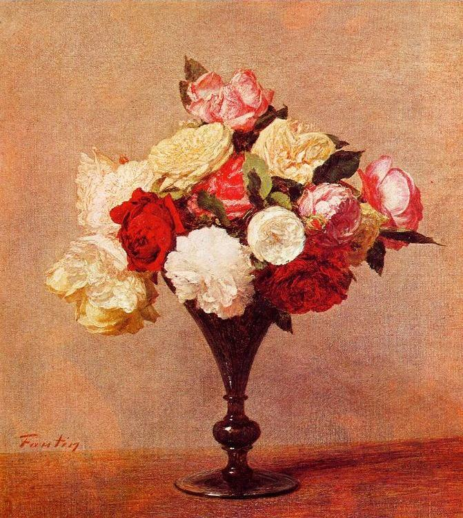 «Розы в вазе», натюрморт Анри Фантена-Латура